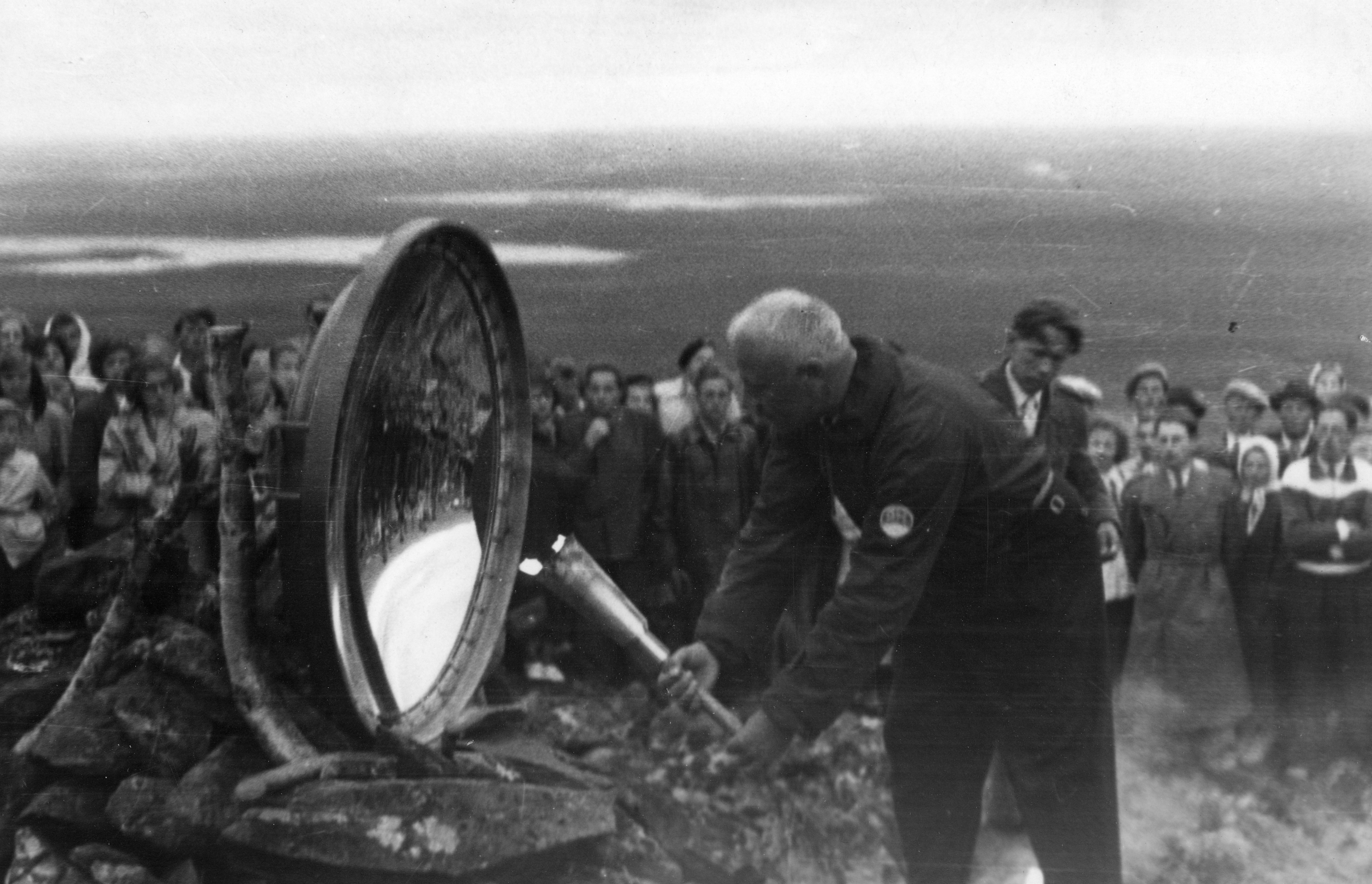 Metsäneuvos Jarl Sundqvist sytyttää olympiatulta peilin avulla keskiyön auringosta Pallastunturilla 6.7.1952.